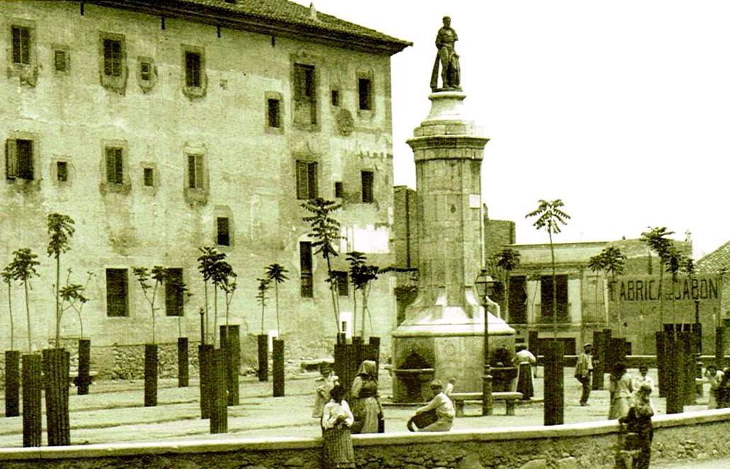 Imatge de la plaça d'Hércules, amb la font i el monument a finals del segle XIX